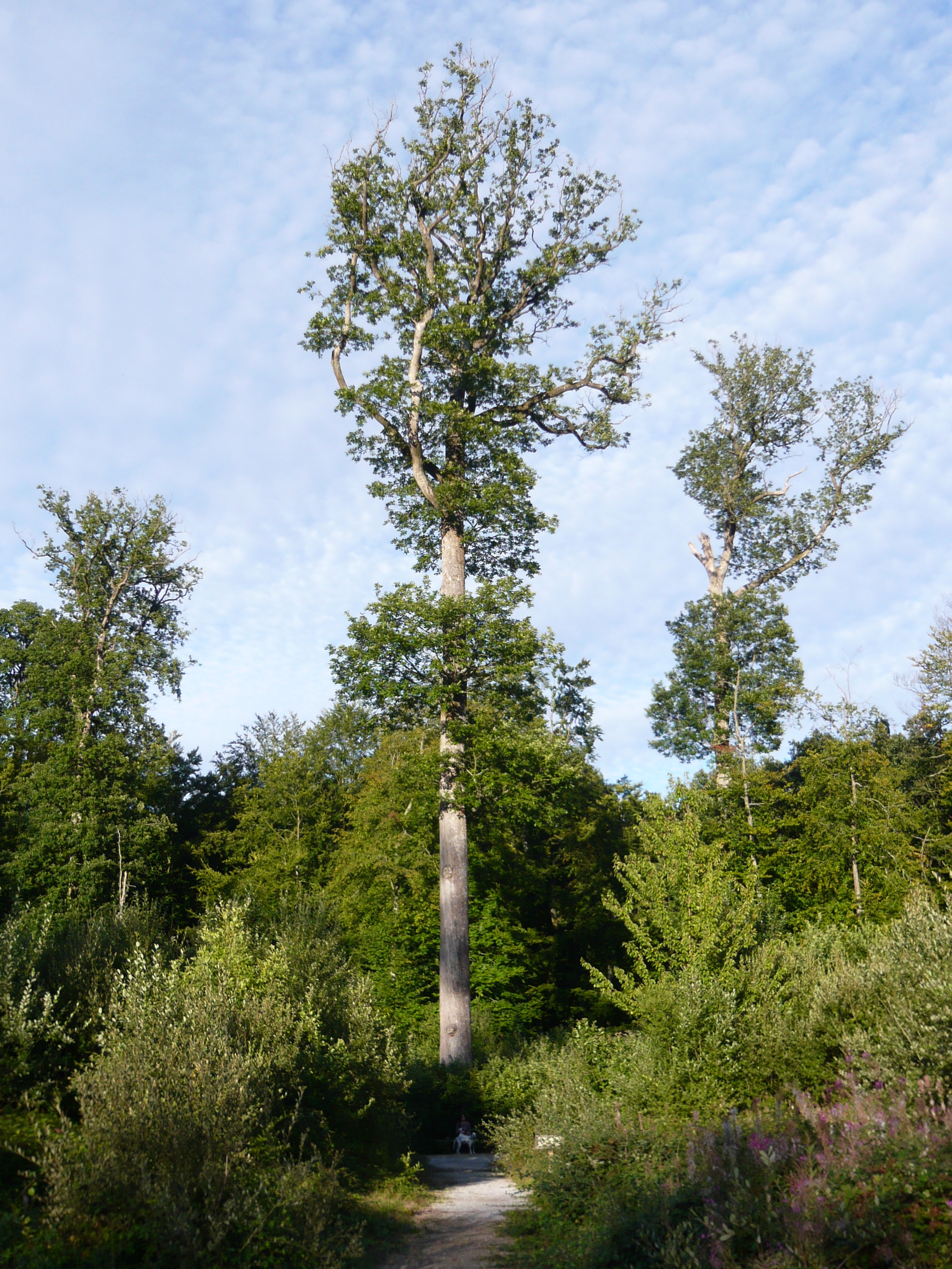 Chêne sessile de la Forestry Commission, Quercus petrae, forêt de Réno-Valdieu, Orne (France).